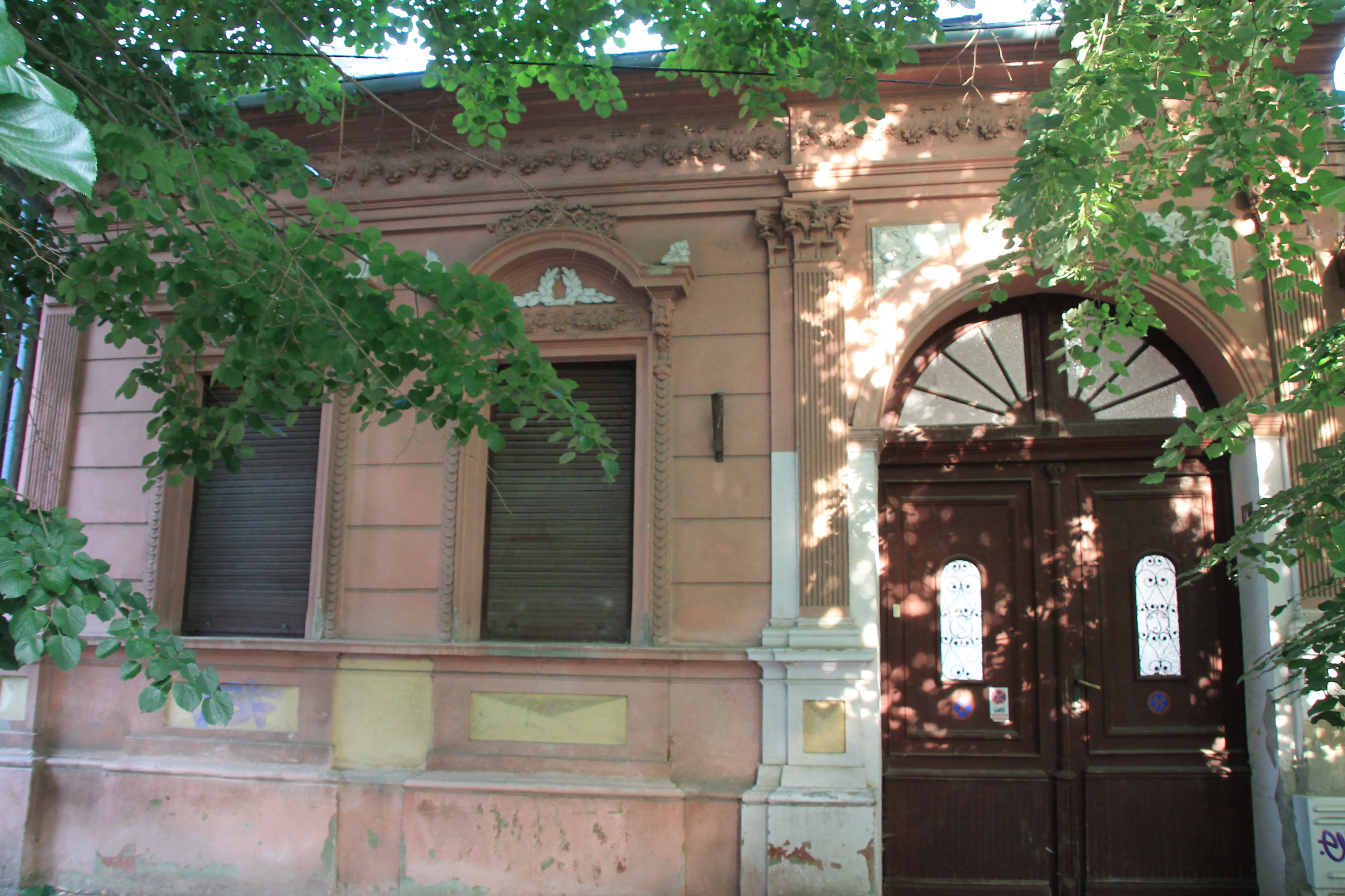 Ulica Matice srpske